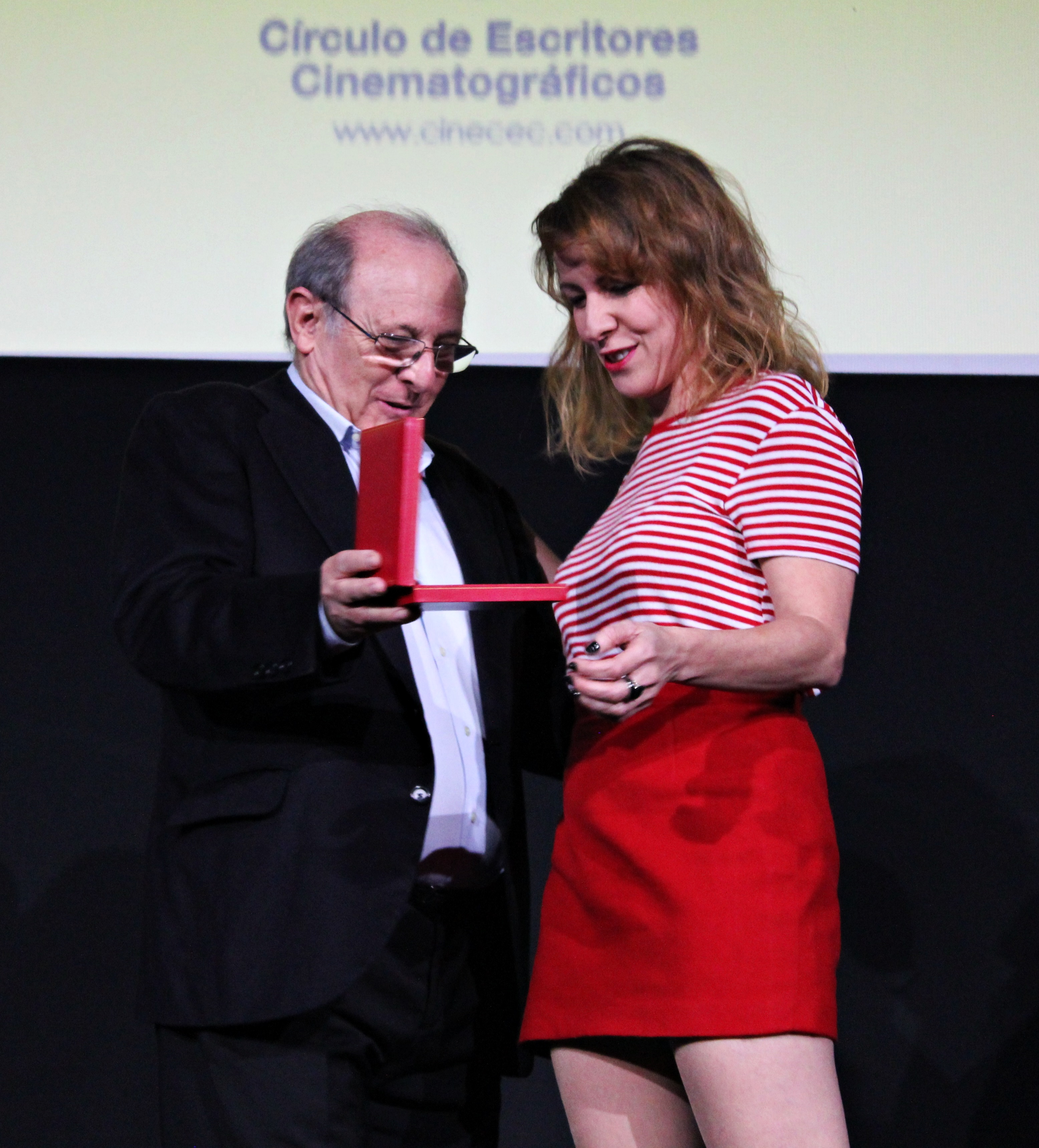 El actor español Emilio Gutiérrez Caba entrega la medalla a la actriz revelación a Eva Llorach por su interpretación en la película Quién te cantará durante la 74 edición de las Medallas del Círculo de Escritores Cinematográficos.